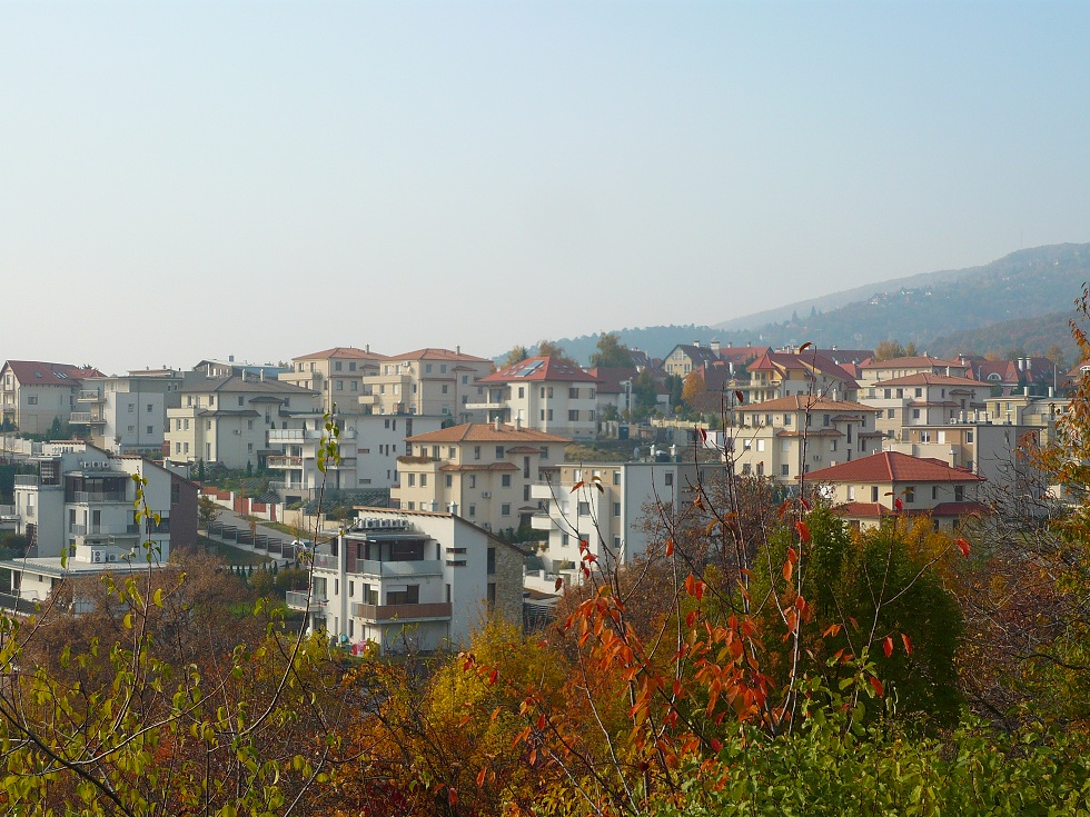 Madárhegy, Budapest, District XI., Kányakapu utca